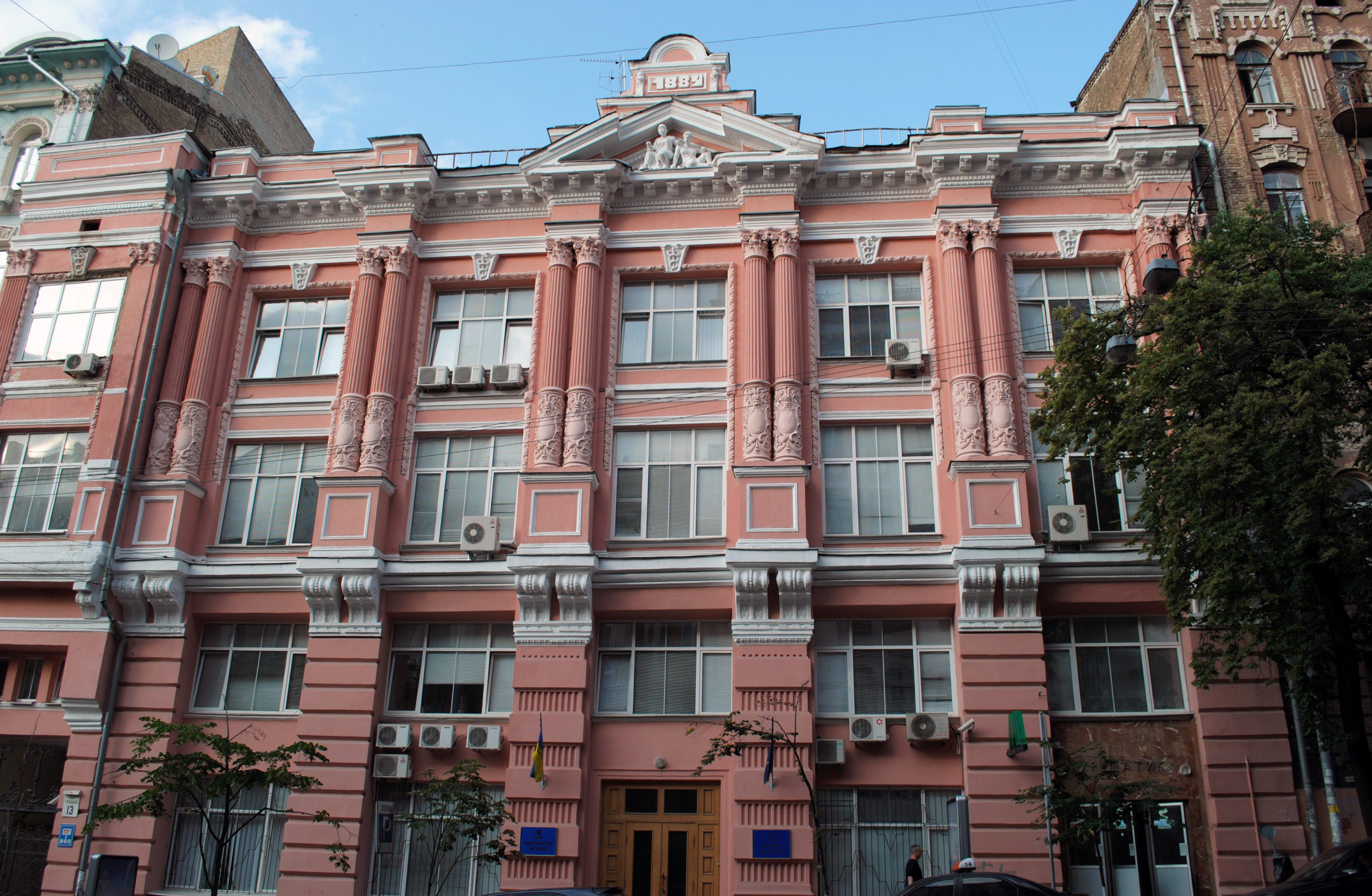 Будинок прибутковий з торговим домом Кімаєра І., Київ, Городецького Архітектора вул., 13